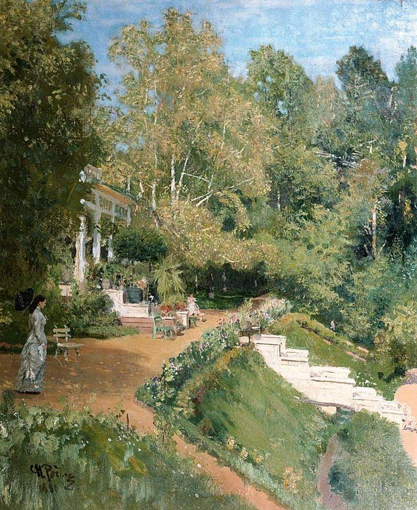 Autumn day in Abramtsevolabel QS:Len,"Autumn day in Abramtsevo"label QS:Les,"Día de verano en Abramtsevo"label QS:Lru,"Осенний пейзаж. Абрамцево"